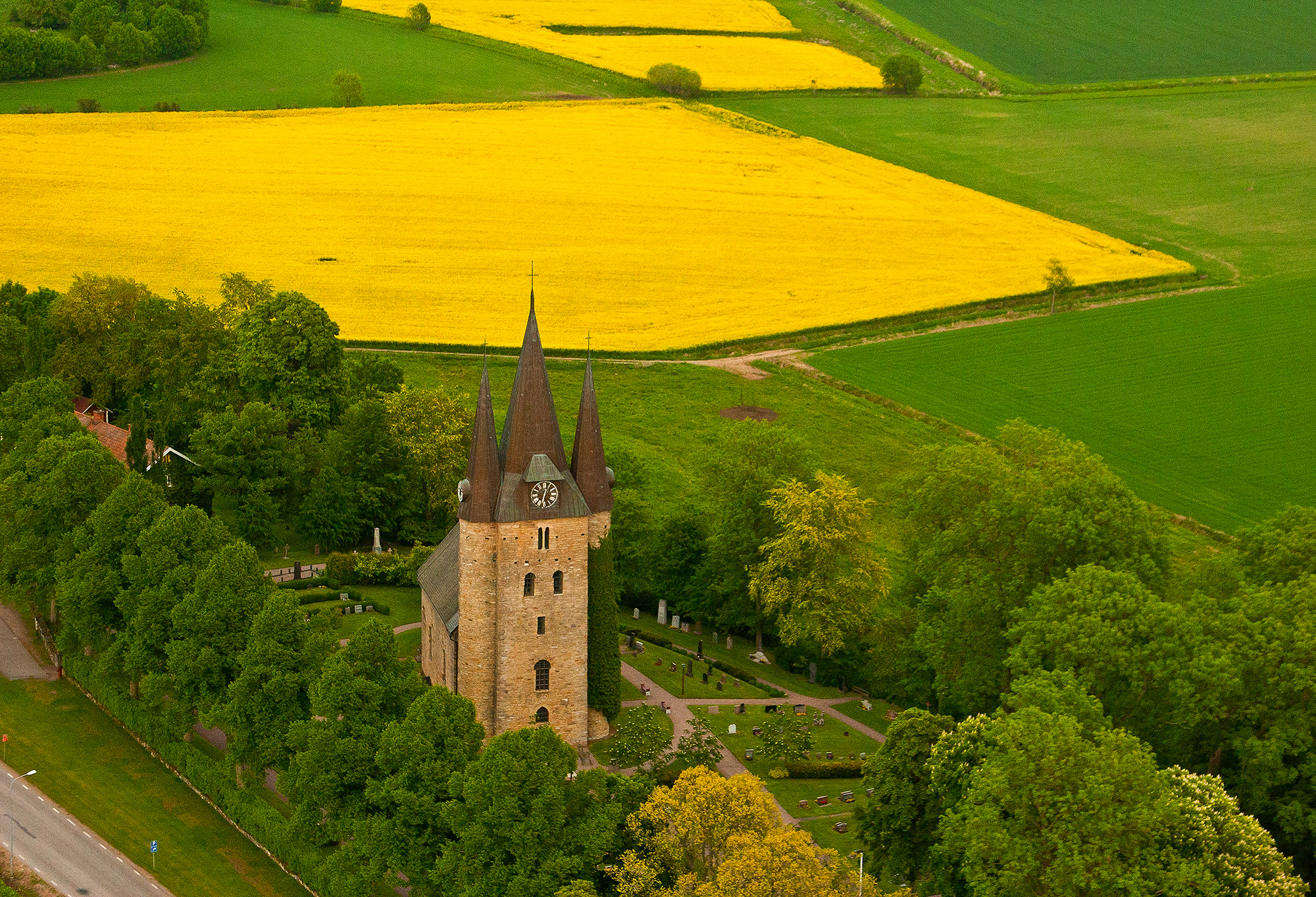 Husaby kyrka, Götene, Västergötland, Sverige, 2006 Flygfoto, LCProBild, High Level Photography by Can Burcin Sahin